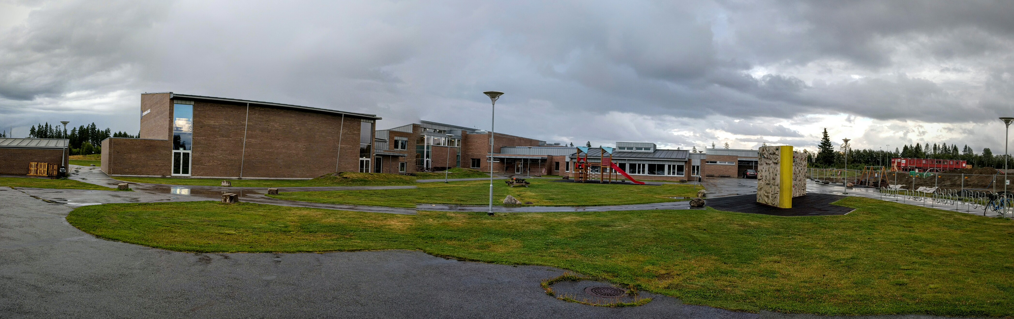 Gystadmarka skole på Jessheim